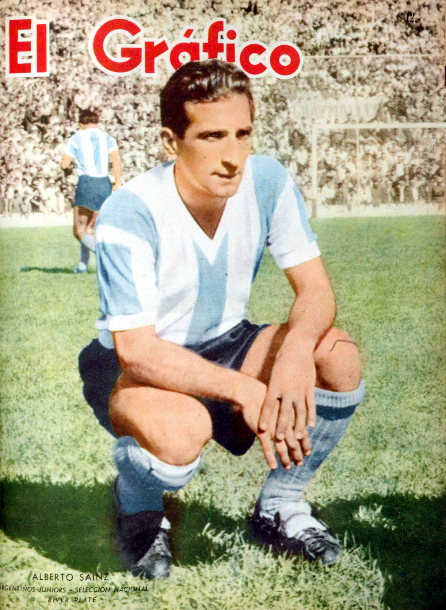 El Grafico del 07 de Marzo de 1962. Edicion 2213